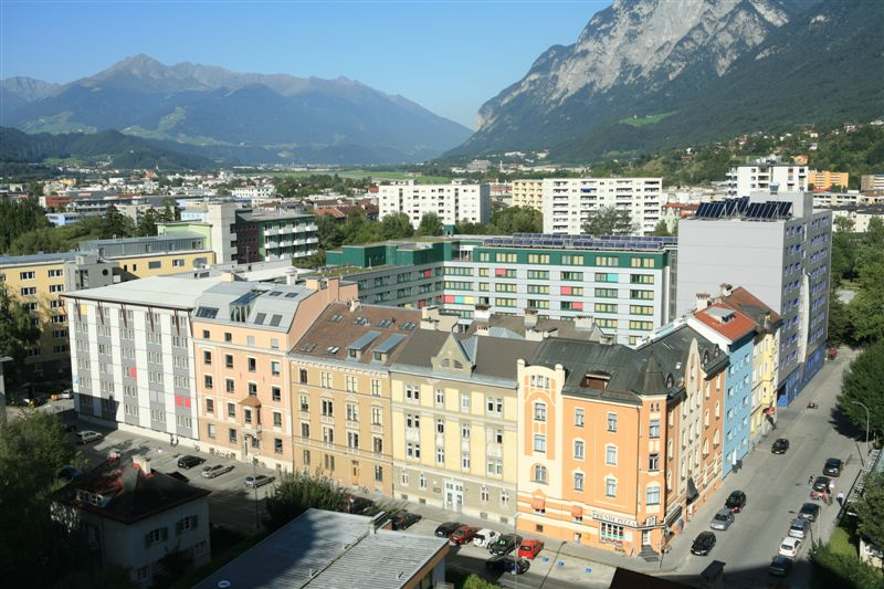 Überblick von oben auf die Gebäude des ISH